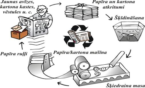 Papīra pārstrādes shēma